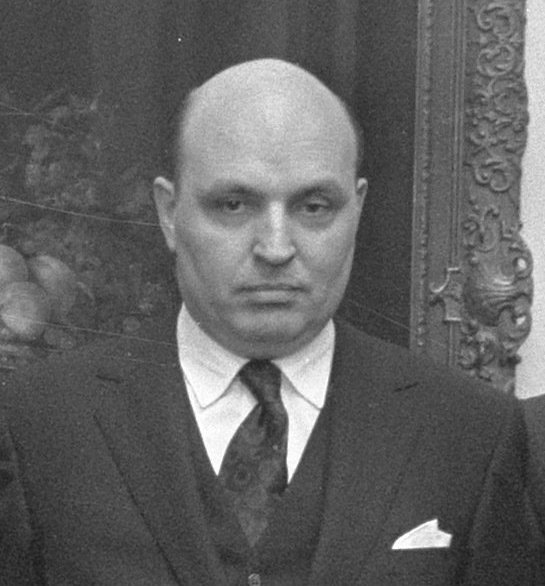 Neuman bij de uitreiking van het rapport van de commissie-Rijckevorsel op het Catshuis in Den Haag. Nederland, 27 maart 1972.